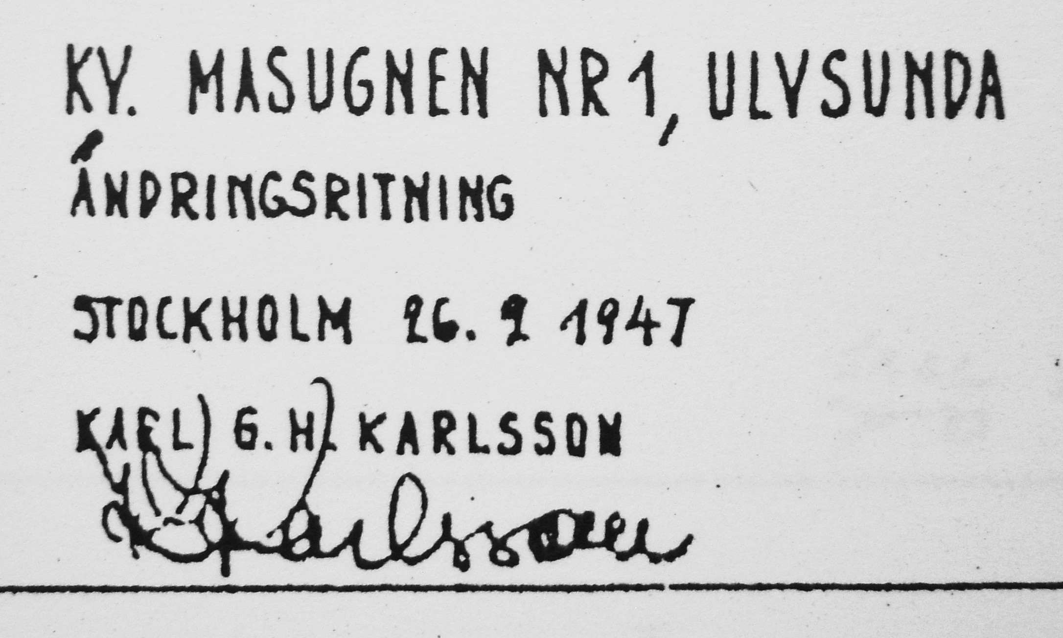 Karl G.H. Karlsson, namnteckning och ritningstext